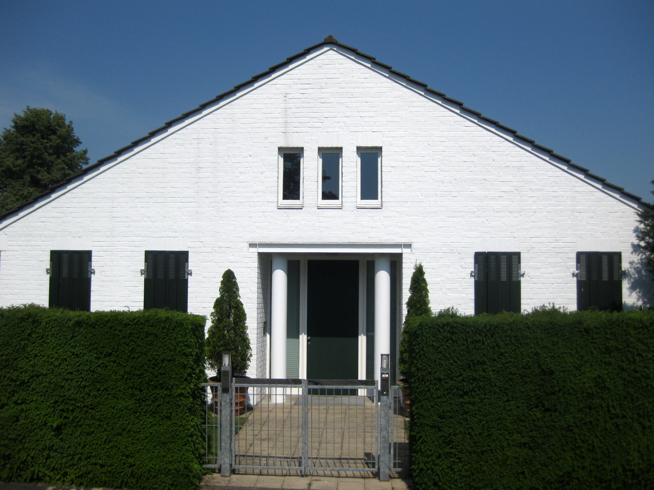 Eingangsfront